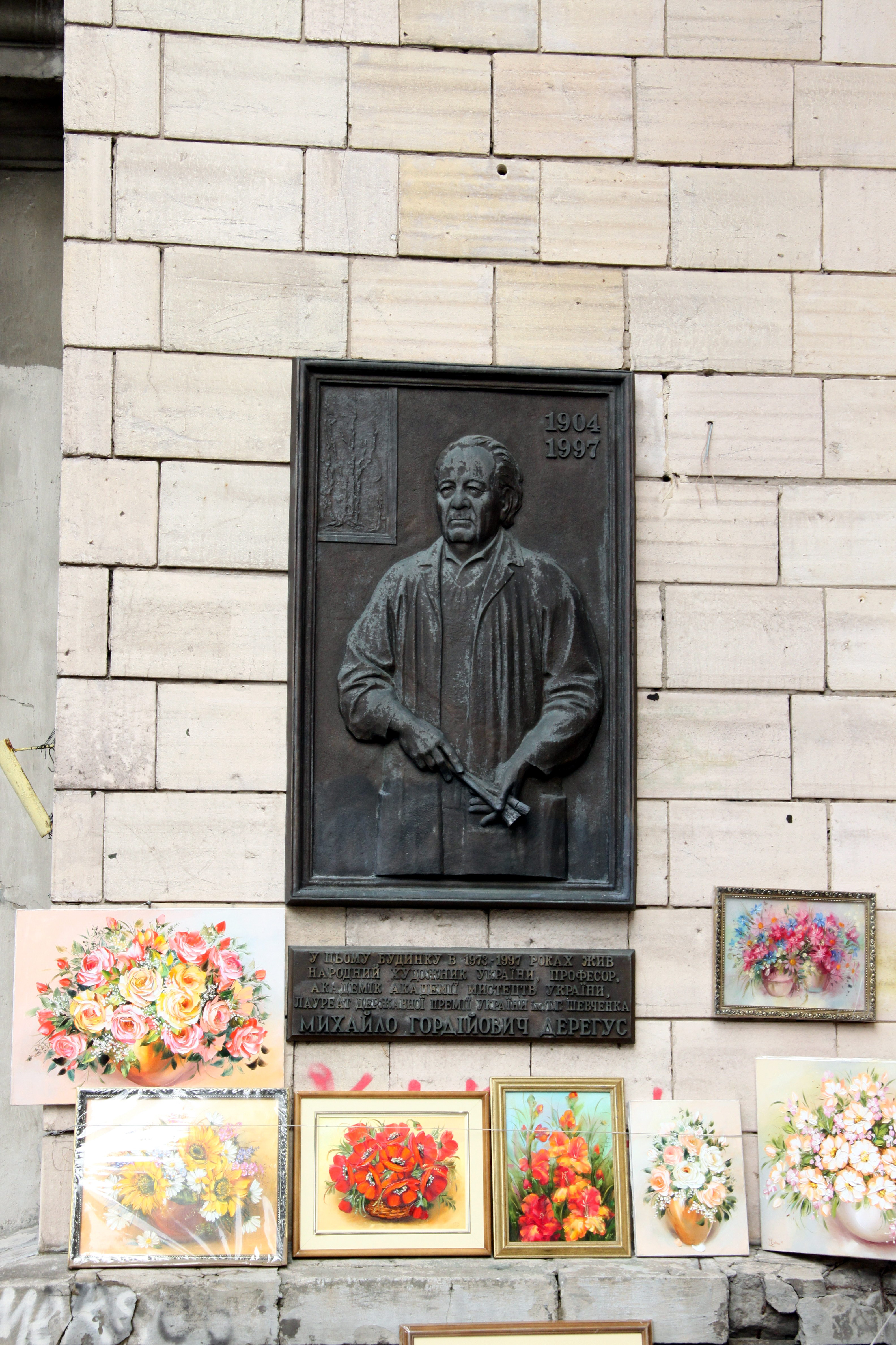 Будинок житловий, в якому у 1972–1997 рр. проживав художник Дерегус М. Г., Київ, Володимирська вул., 9